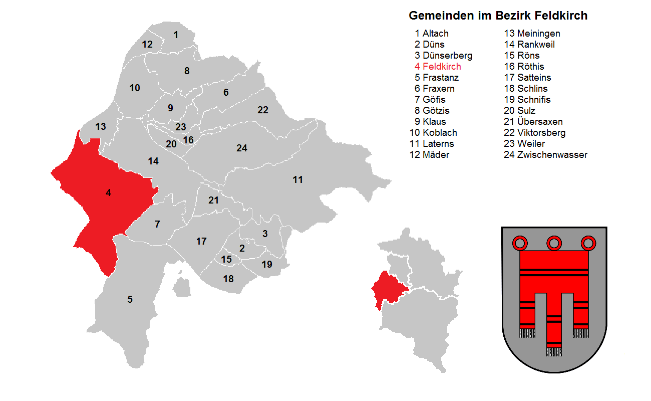 Bezirk Feldkirch